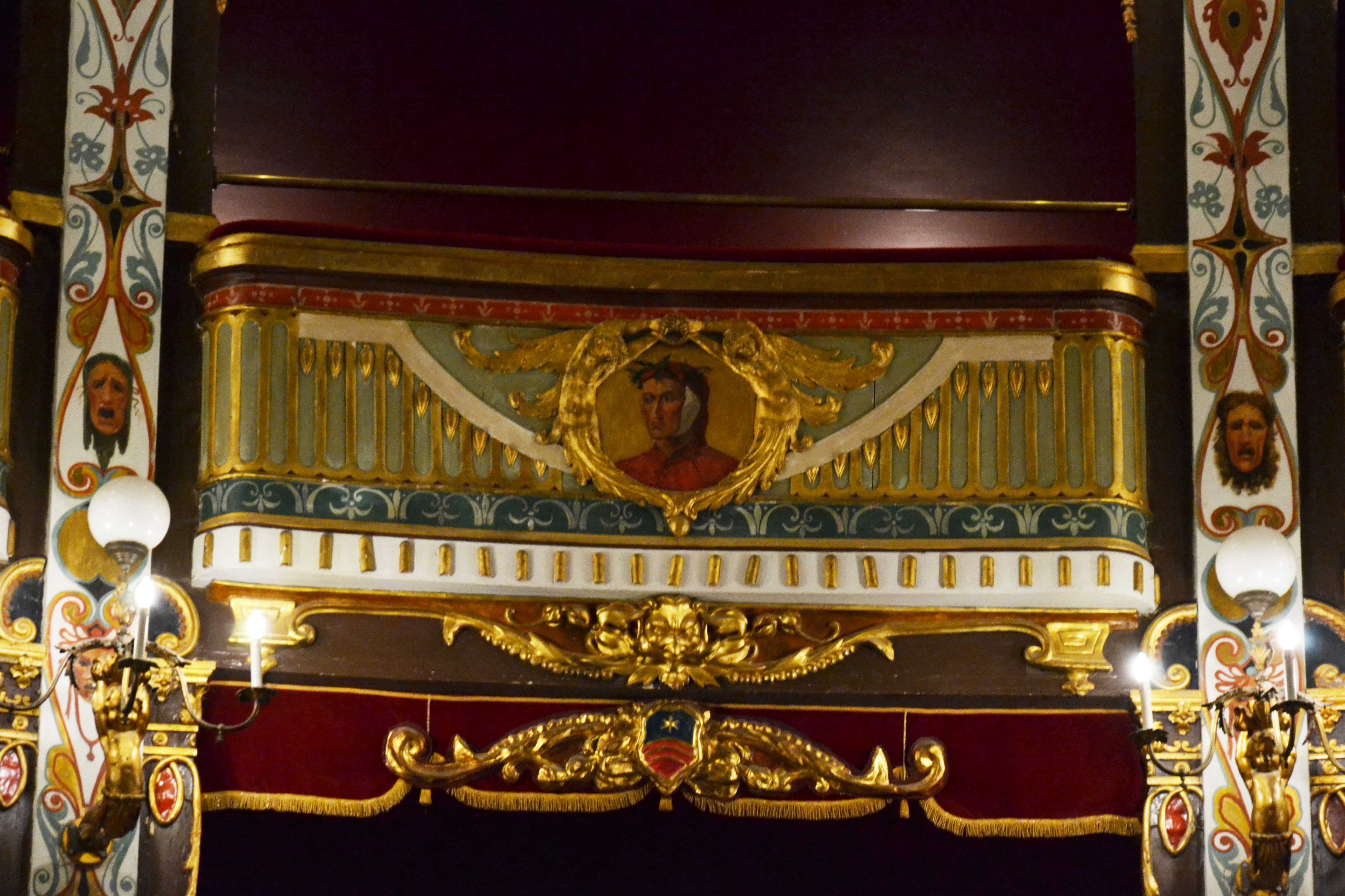 teatro Verdi Salerno